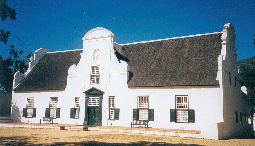 FC Georgio 1998 Propriété de Groot Constantia (Le Cap)